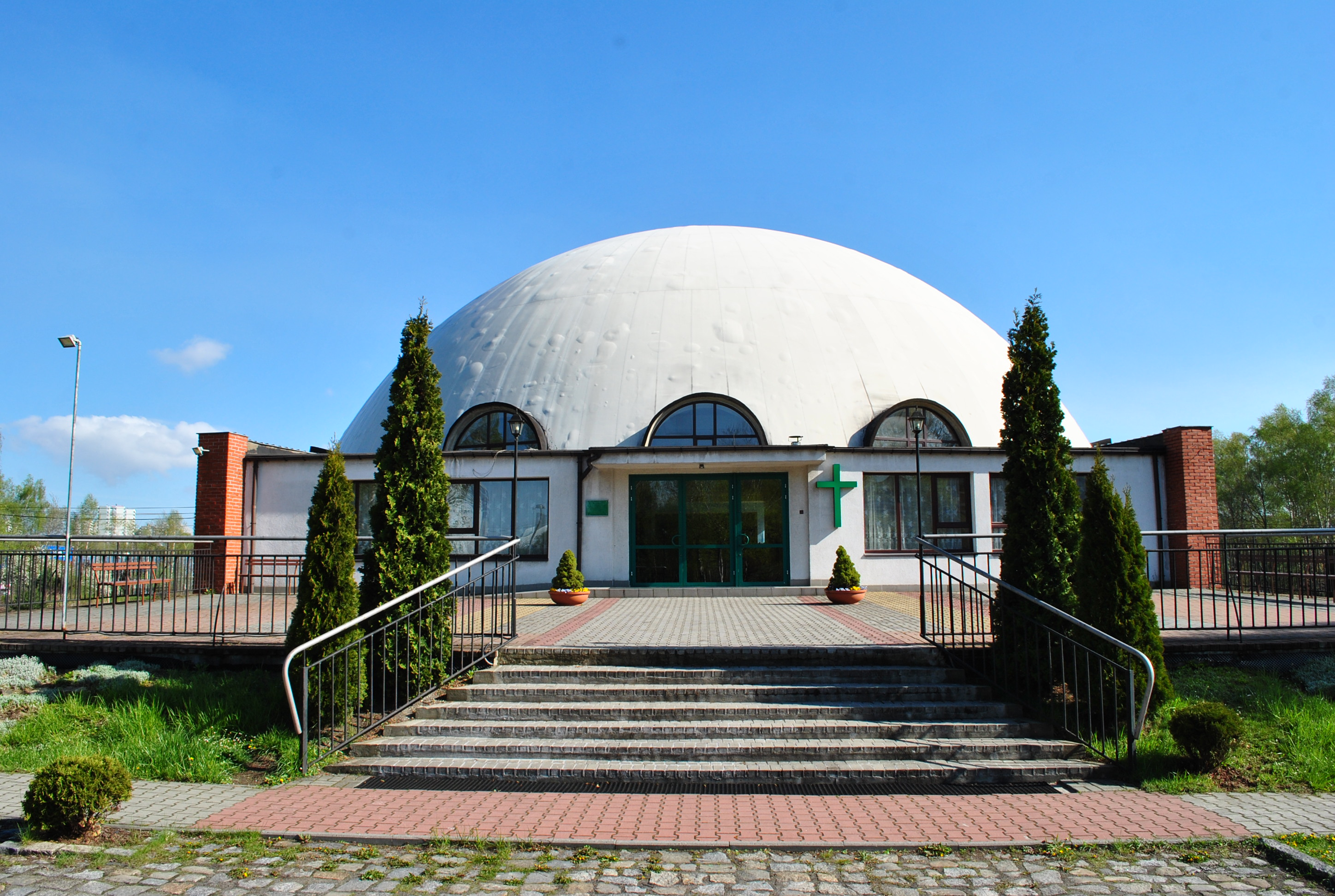 Katowice - Załęże. Zbór zielonoświątkowców Betania